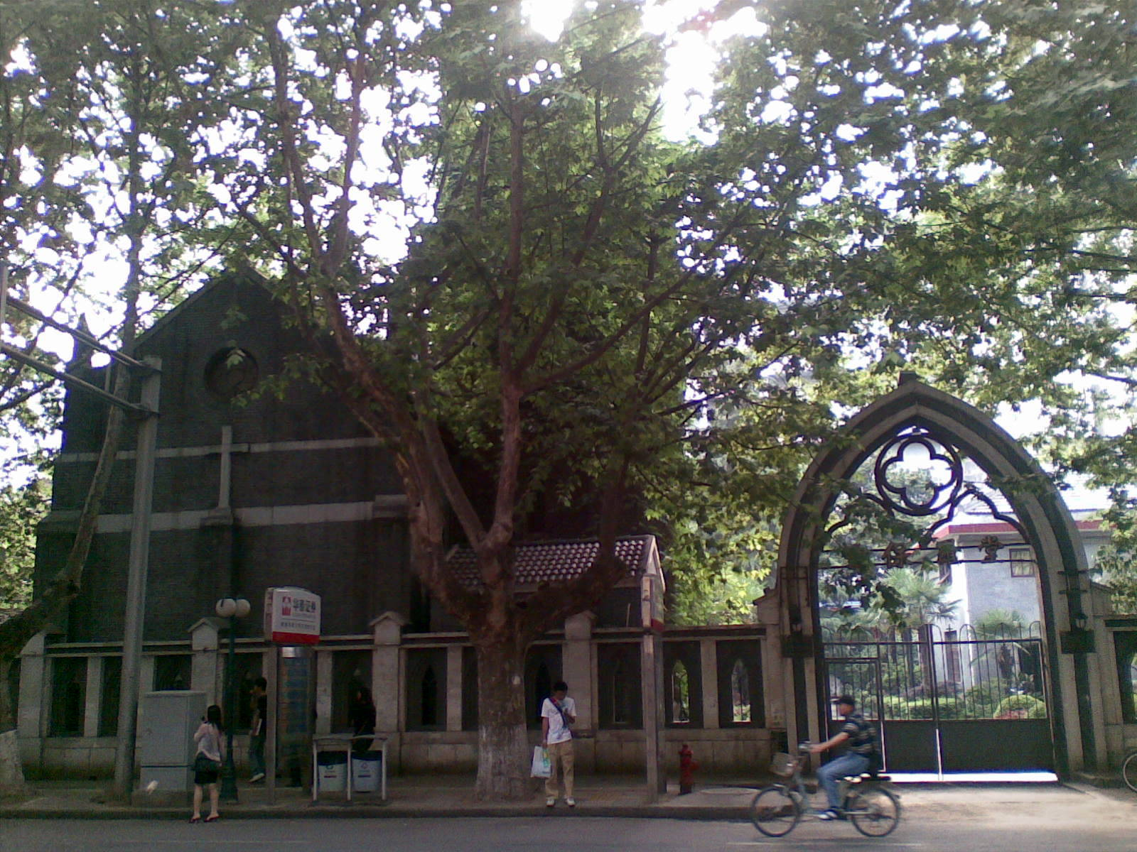 南京圣保罗堂外